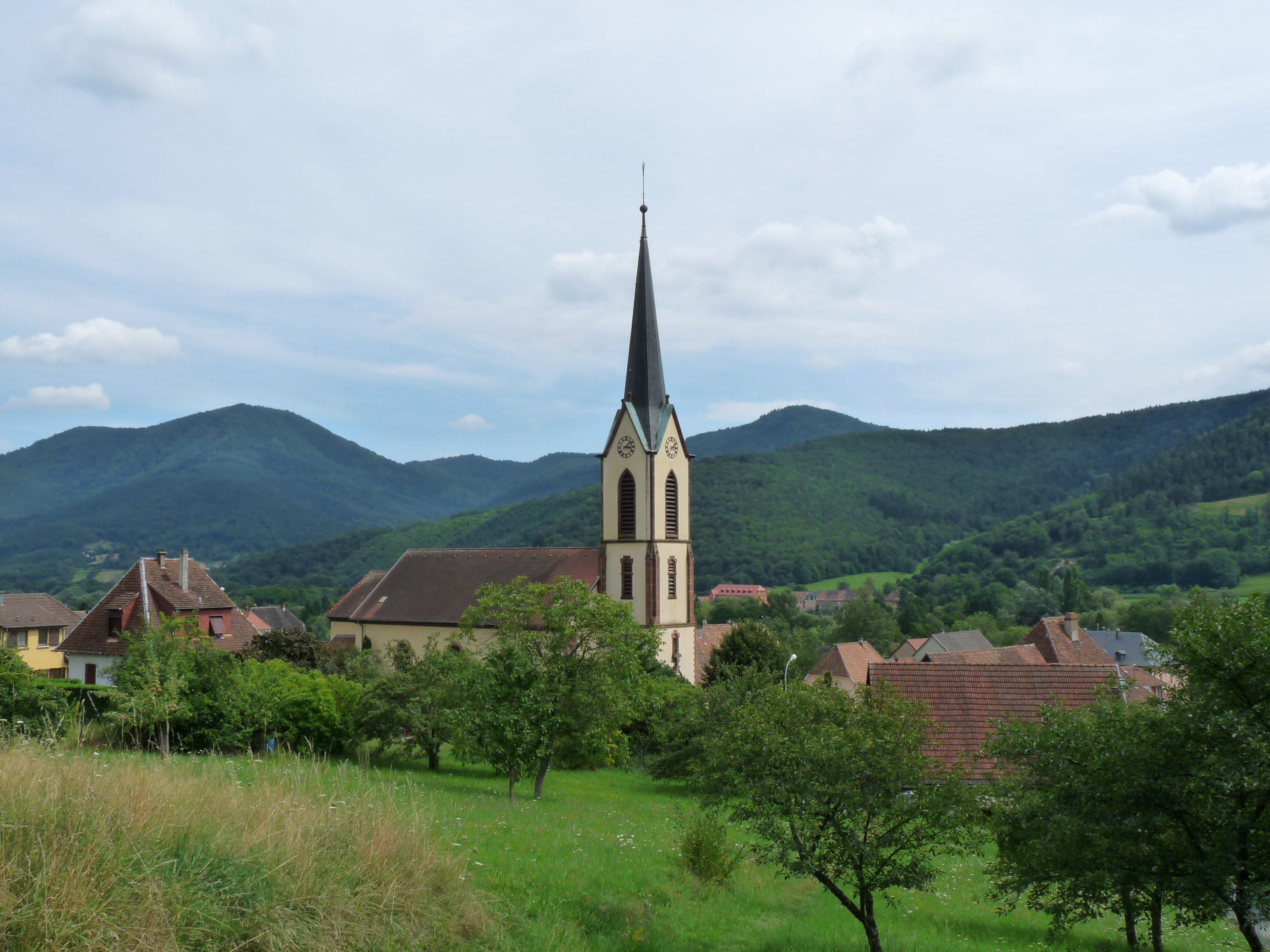 Eglise simultanée Saint-Imier de Gunsbach (Haut-Rhin)